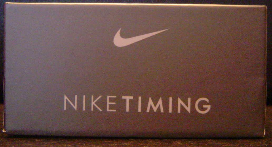 Boitier Montre Nike